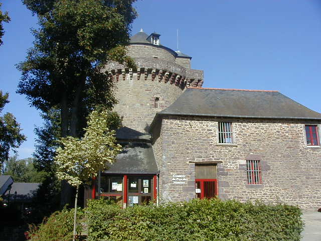 Ecomusée situé dans la tour du Papegaut à Montfort-sur-Meu